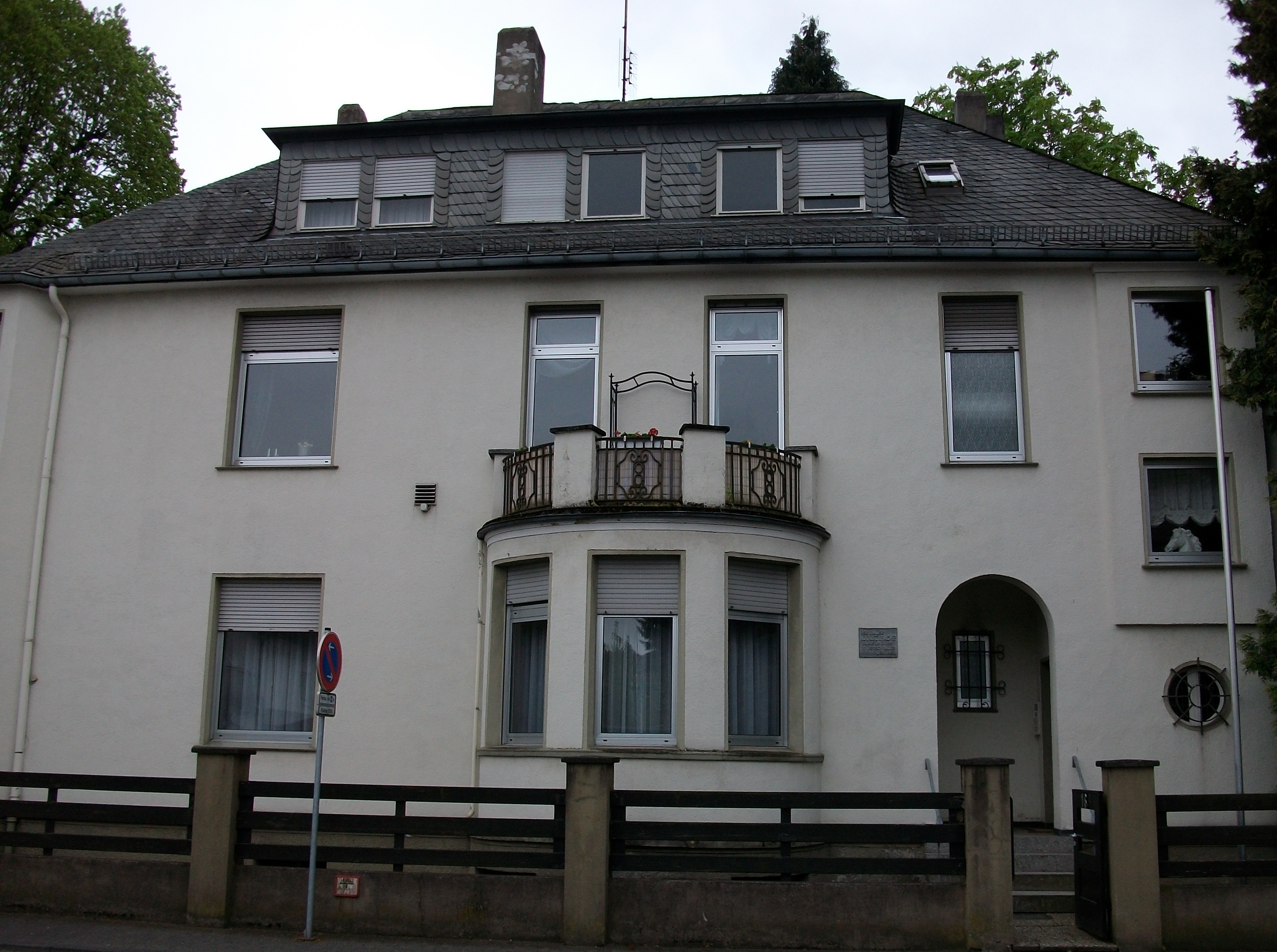 Eingang (mit Hinweisschild) zum Geburtshaus von August Macke, Meschede, Schützenstraße (Germany)